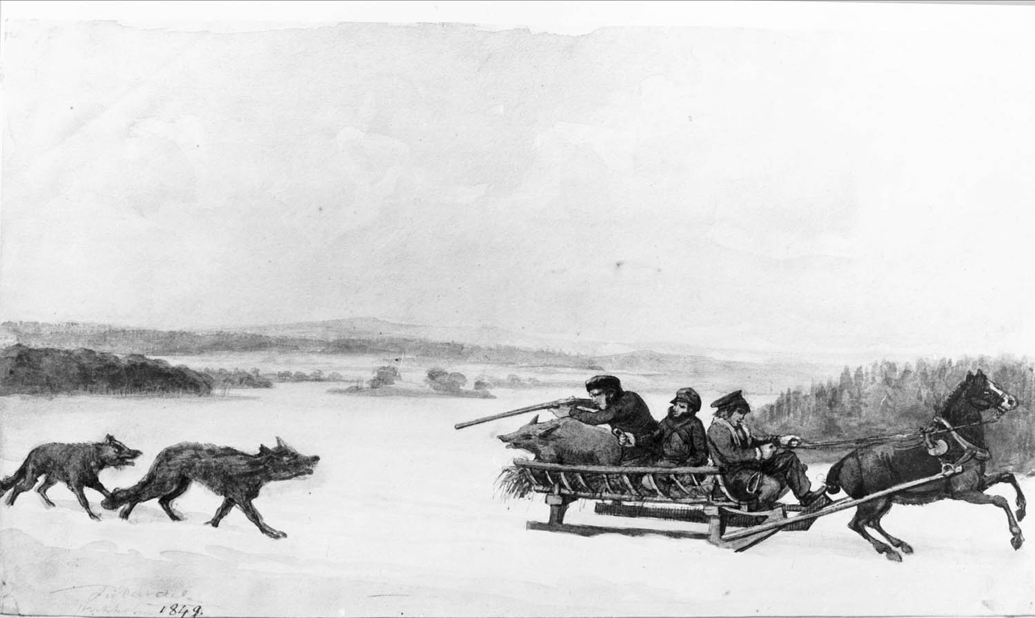 "Wargjagt i Westergötland." En släde med tre män och en gris förföljs av två vargar. Fritz von Dardel 1847.